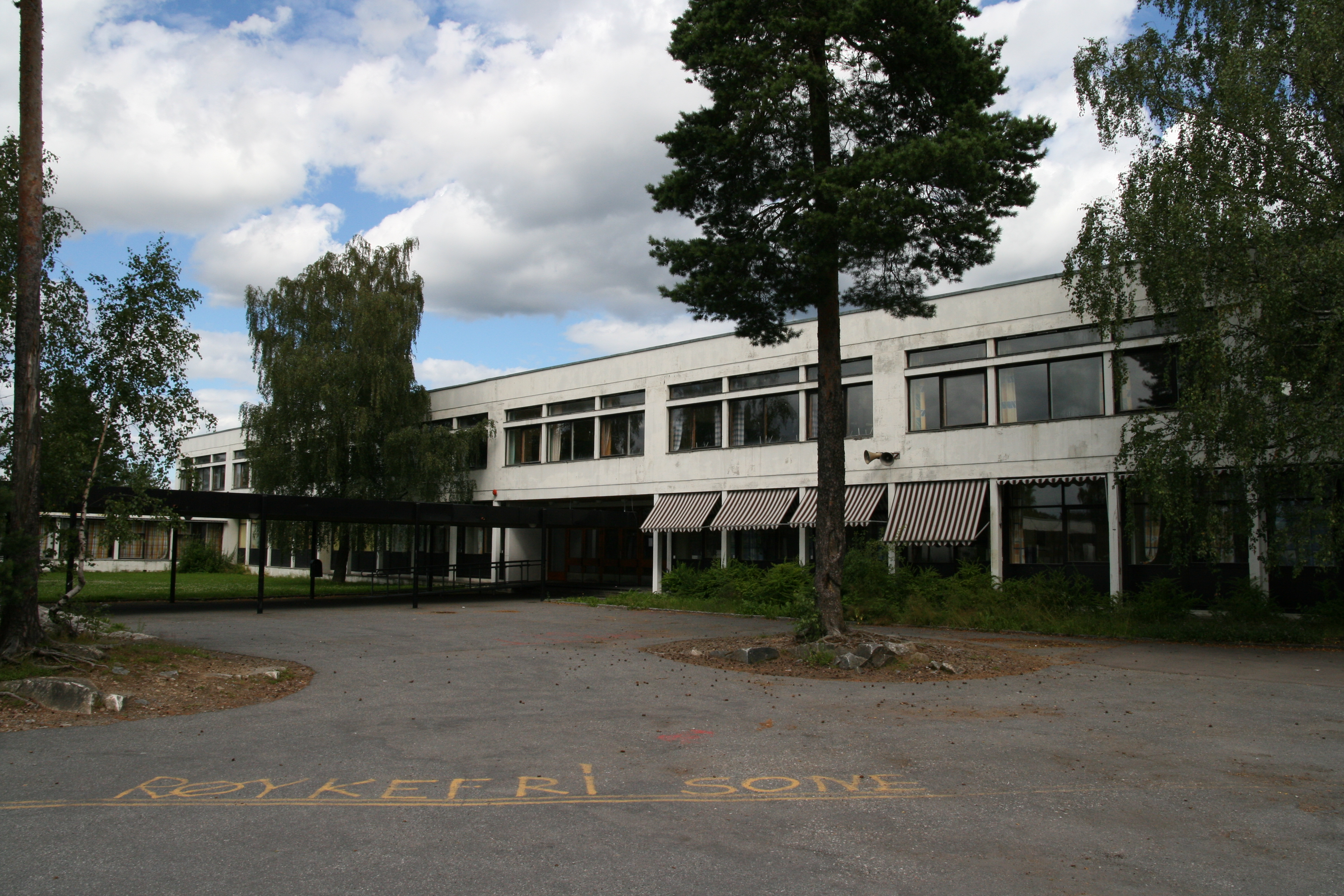 Skolegården på Lambertseter vgs, Oslo